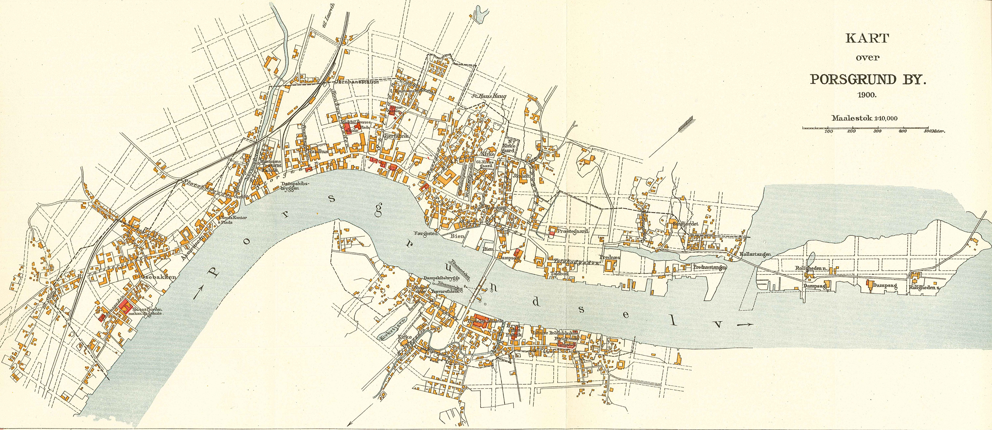 Kart over Porsgrunn.